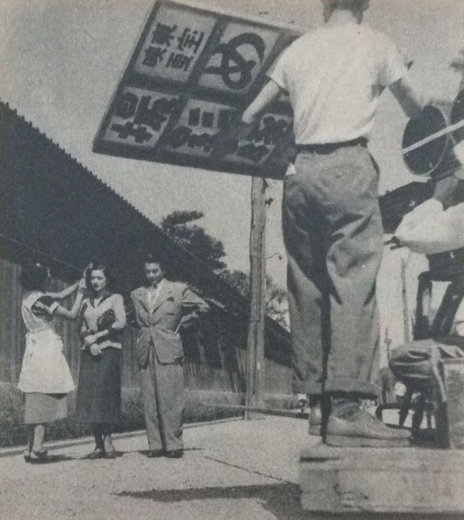 映画『めし』制作風景（ロケ地は帝塚山）。奥は原節子と二本柳寛。